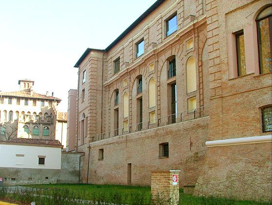 Facciata della Galleria Nuova del castello dei Pico, in viale della Circonvallazione ovest a Mirandola, dopo il restauro del 2006 e prima del sisma del 2012